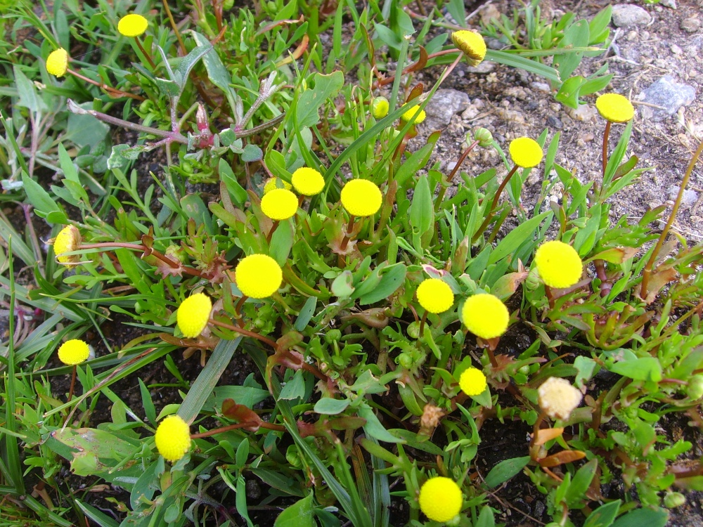 Corula coronopifolia (Île Fédrun, St-Joachim, Loire-Atlantique, Bretagne, France)